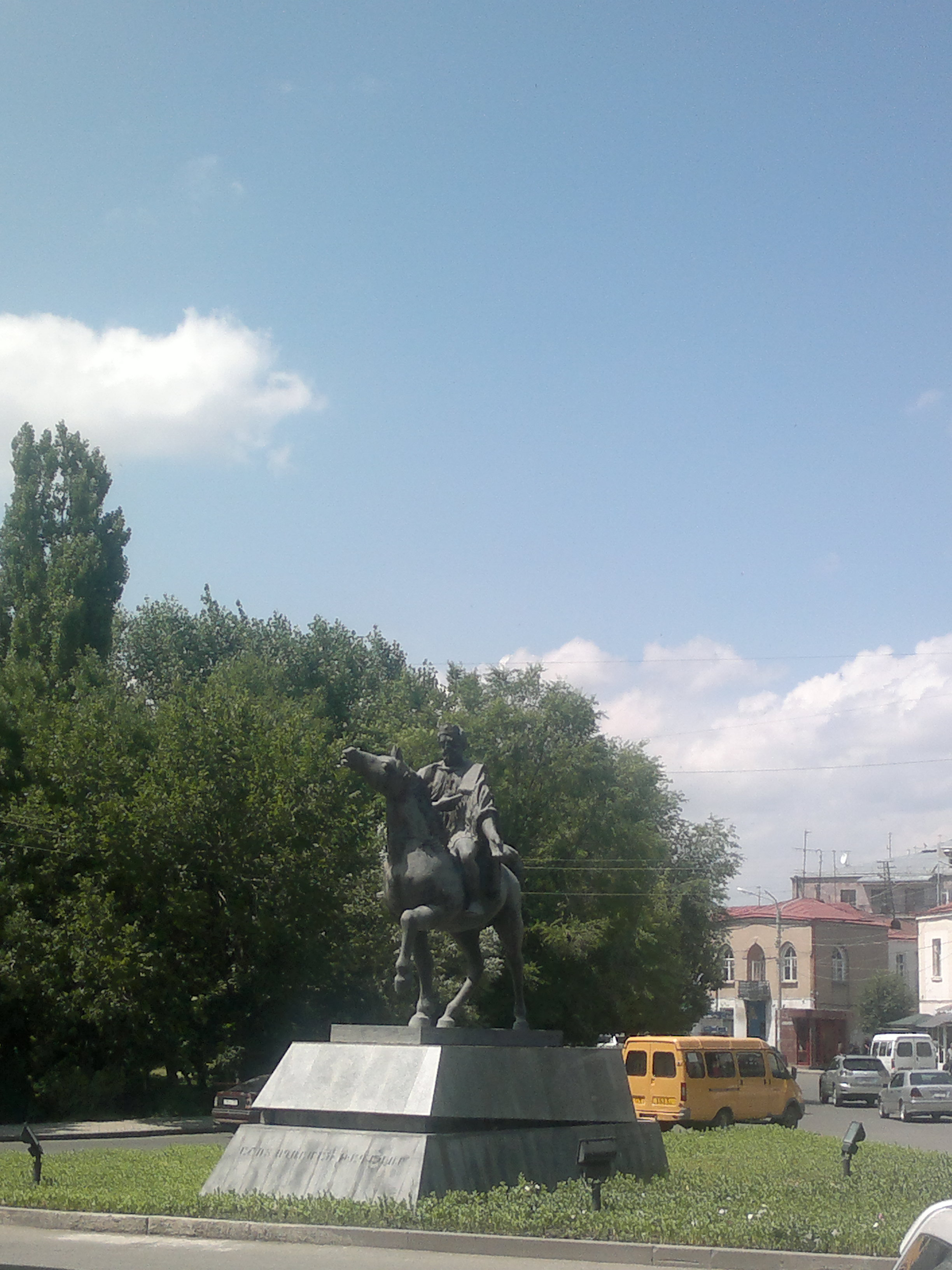 Աշոտ Ողորմած թագավորի արձանը Գյումրիում 1/4